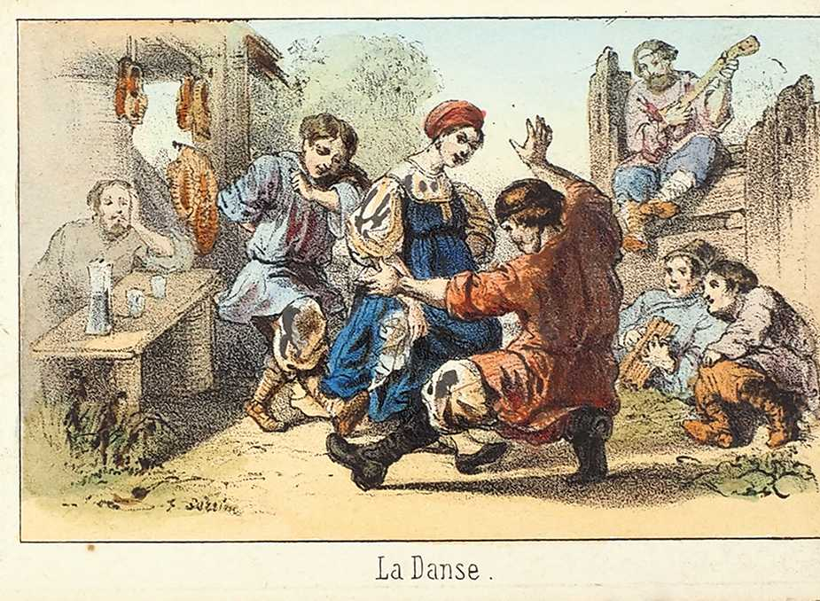 Танец (La Danse)